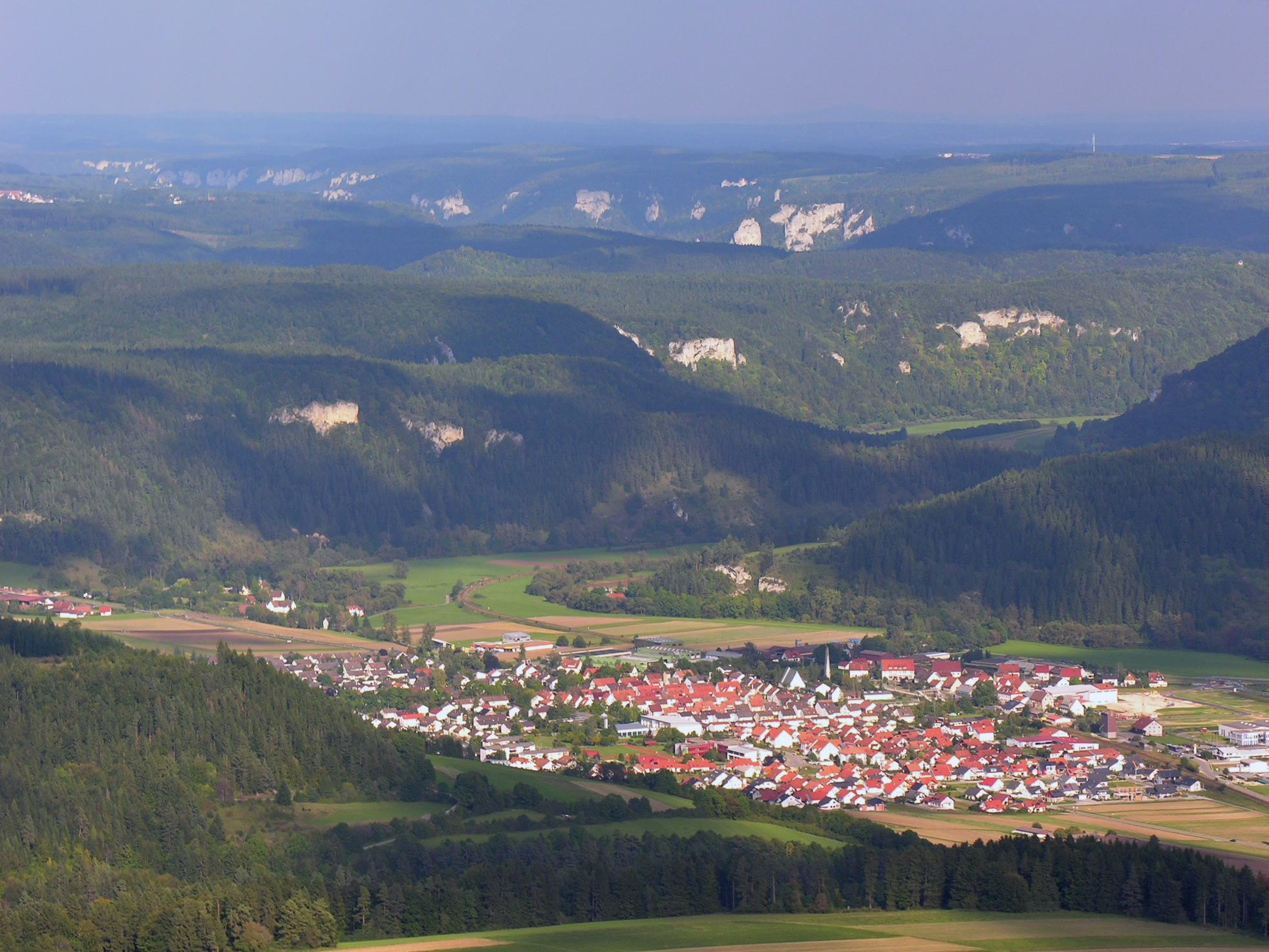 Germany, Baden-Württemberg, aerial view of Mühlheim on the Danube